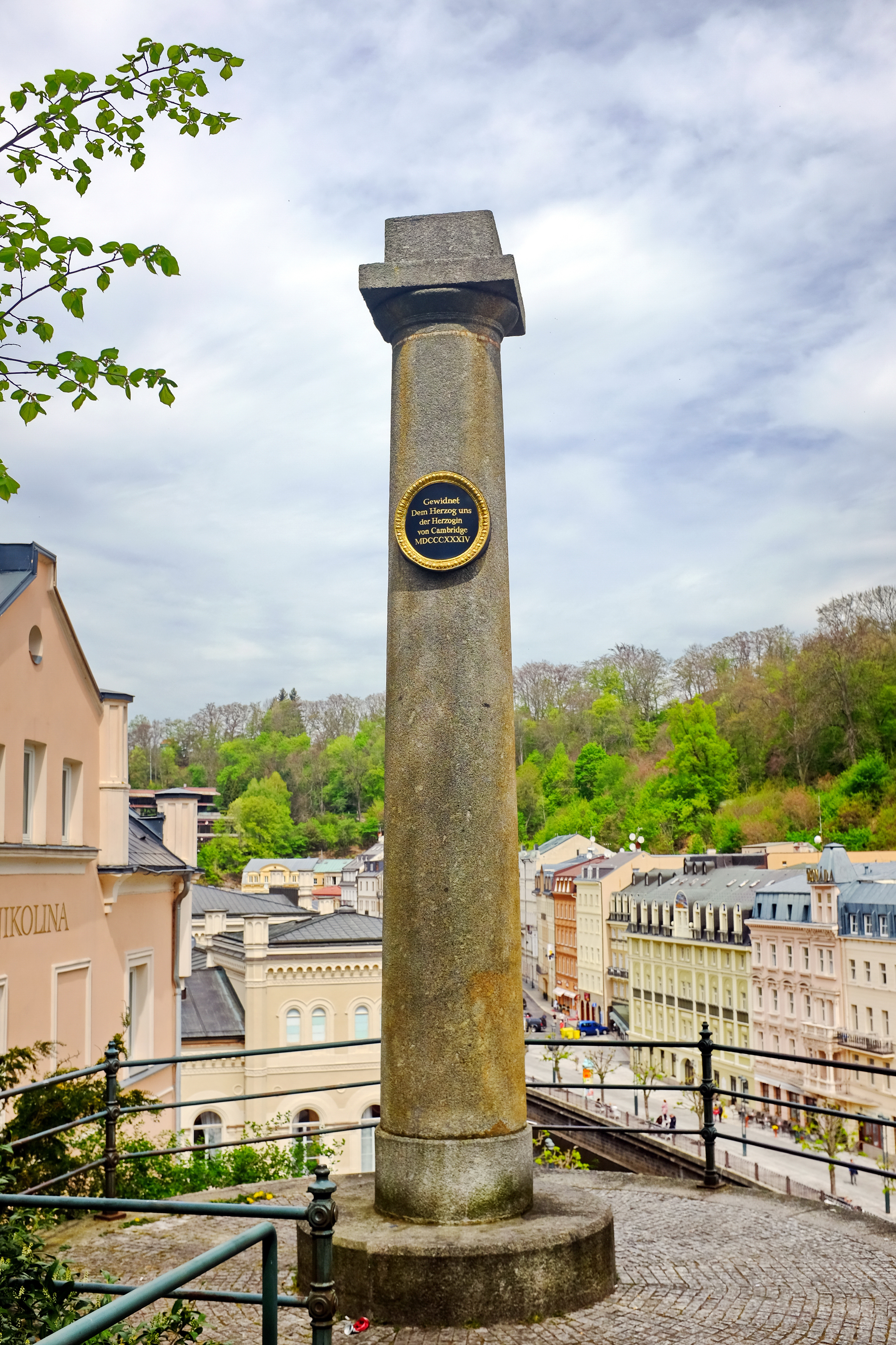 Karlovy Vary, Skalníkovy sady, sloup vévodů cambridgeských